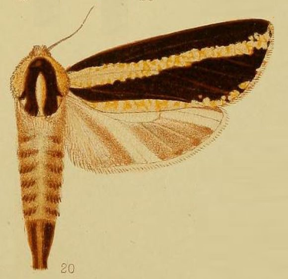 Azygophleps atrifasciata